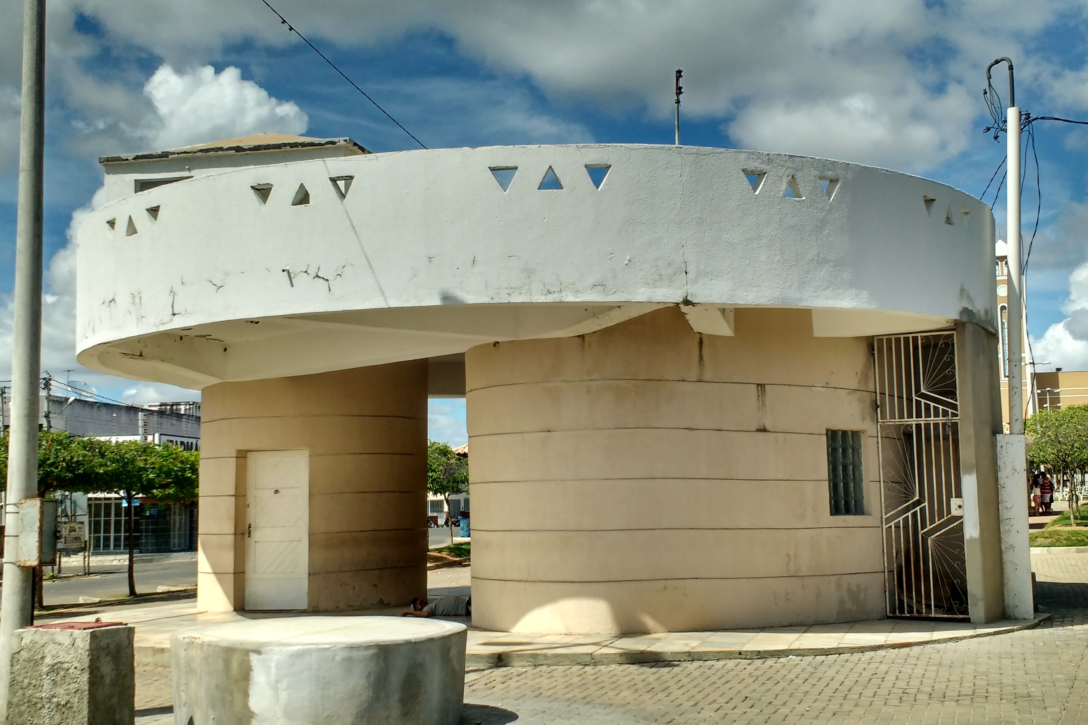 Pavilhão Cônego Caminha na Praça Monsenhor Caminha, centro de Pau dos Ferros, Rio Grande do Norte (Brasil).